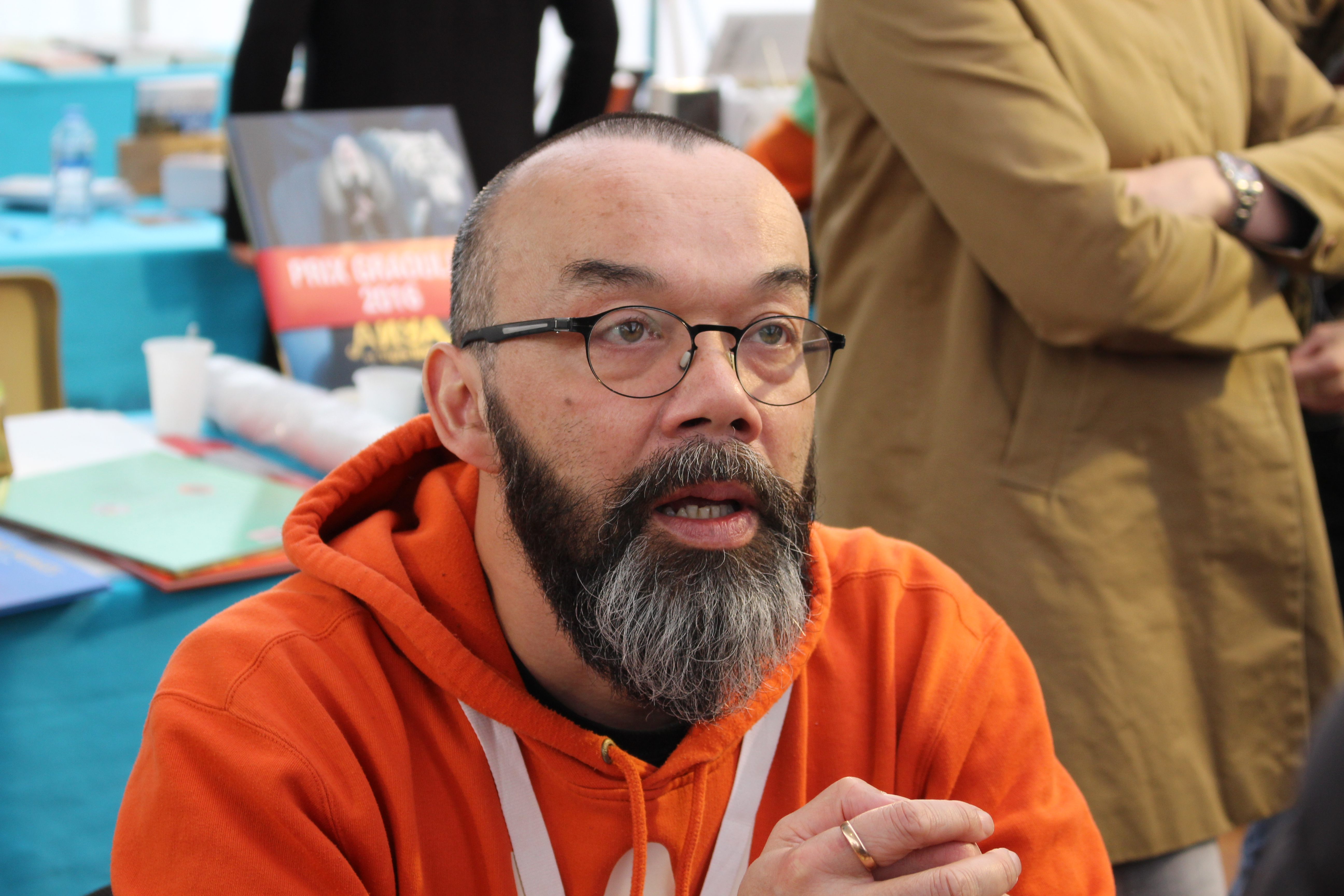 Tai Marc Le Thanh au Festival Le Livre à Metz, le 24 avril 2016.